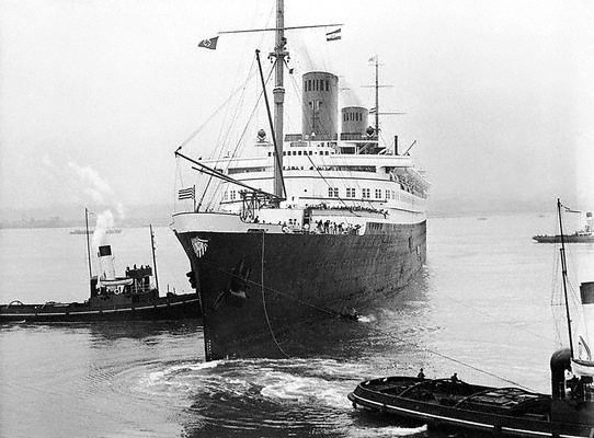 SS Bremen